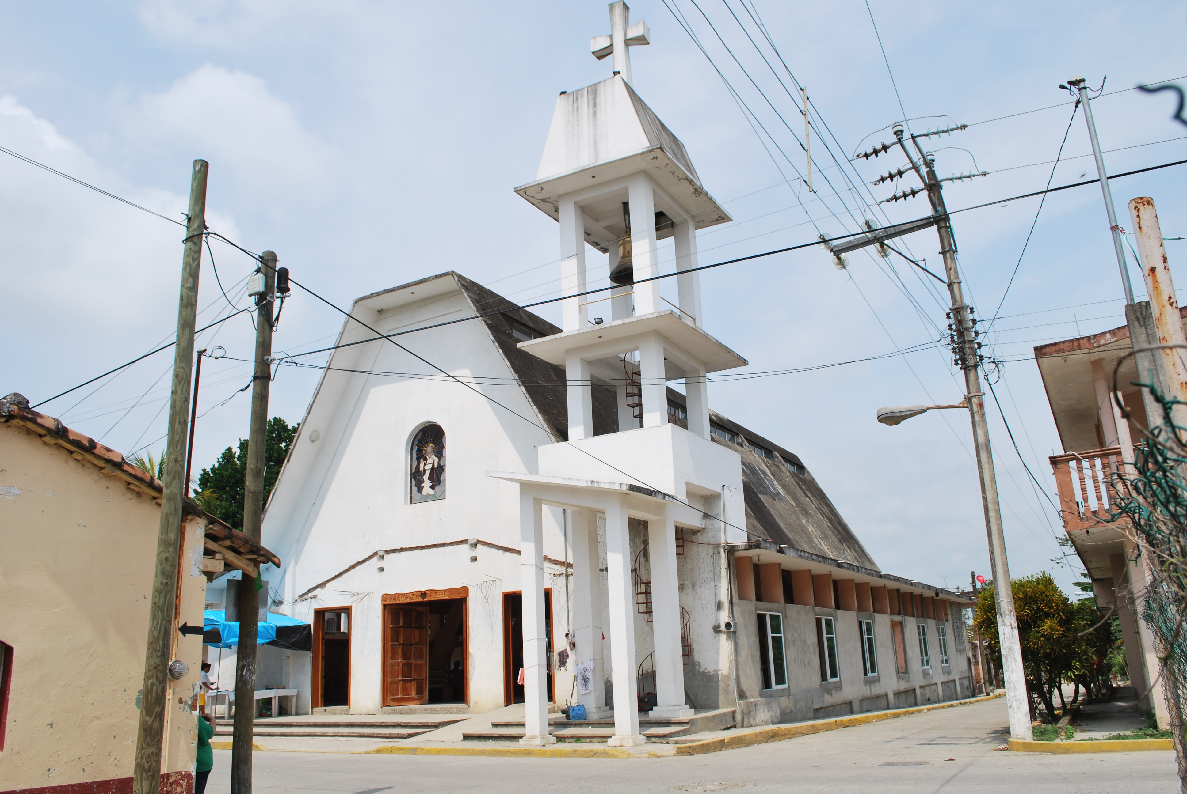 Parish church in Cazones, Veracruz